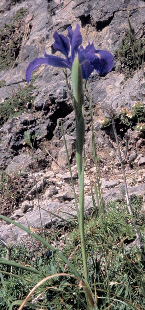 Iris latifolia — à Gavarnie, Parc national des Pyrénées.